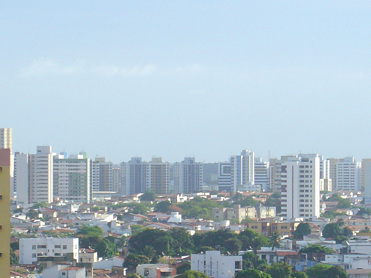 Skyline de Aracaju, visto do centro da cidade.